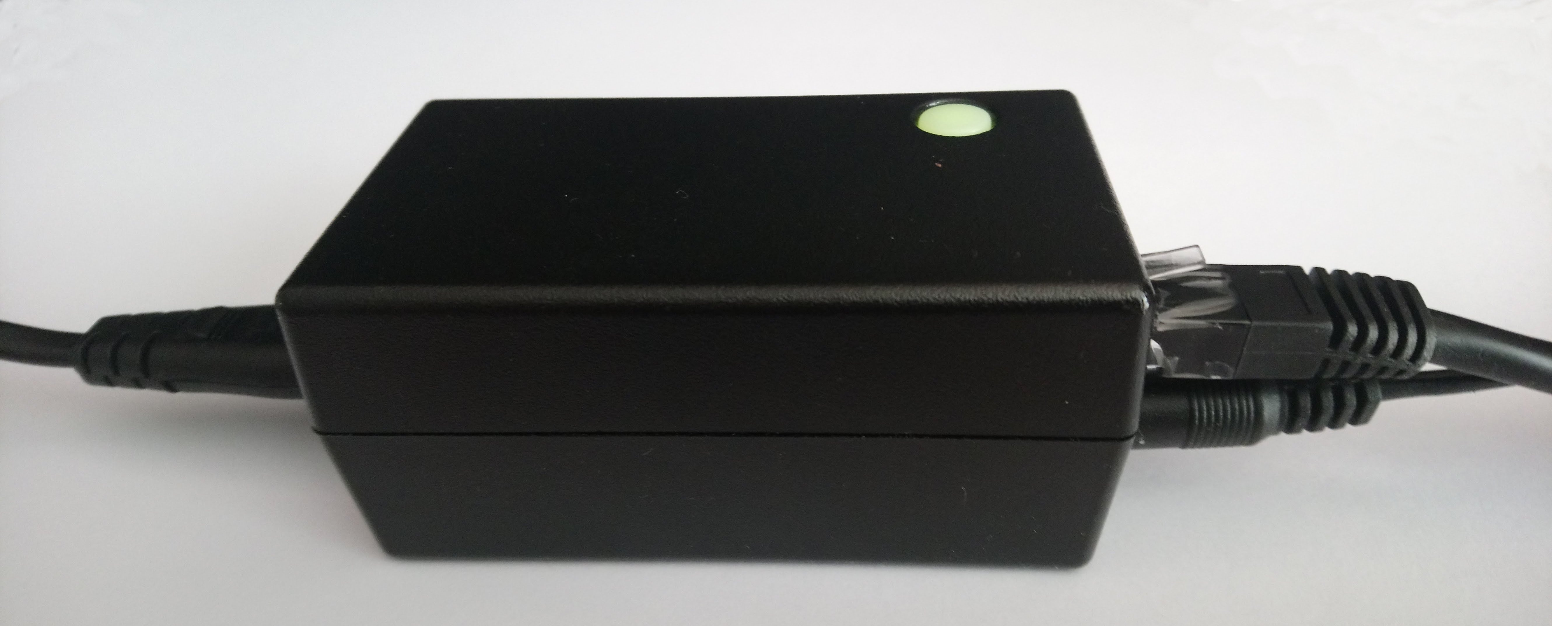 Boitier CPL Freeplug 2ème génération